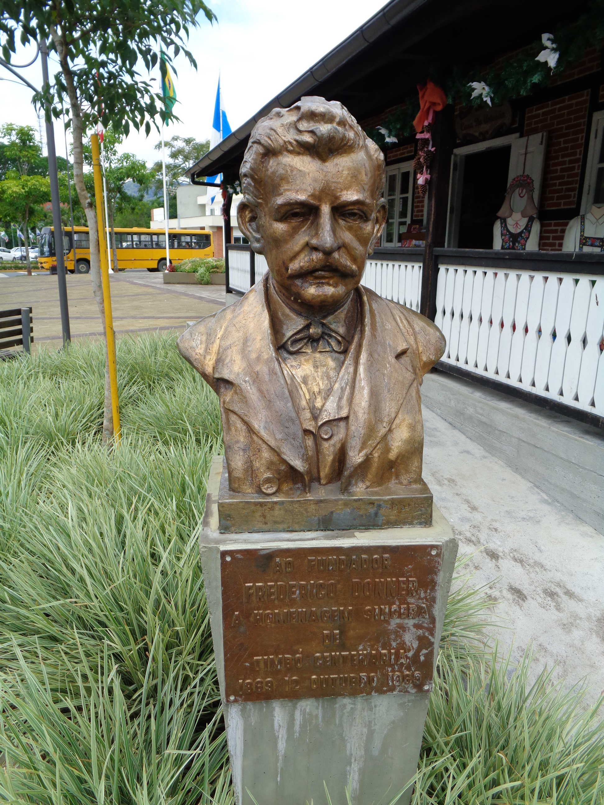 Estátua de Frederico Donner em Timbó.